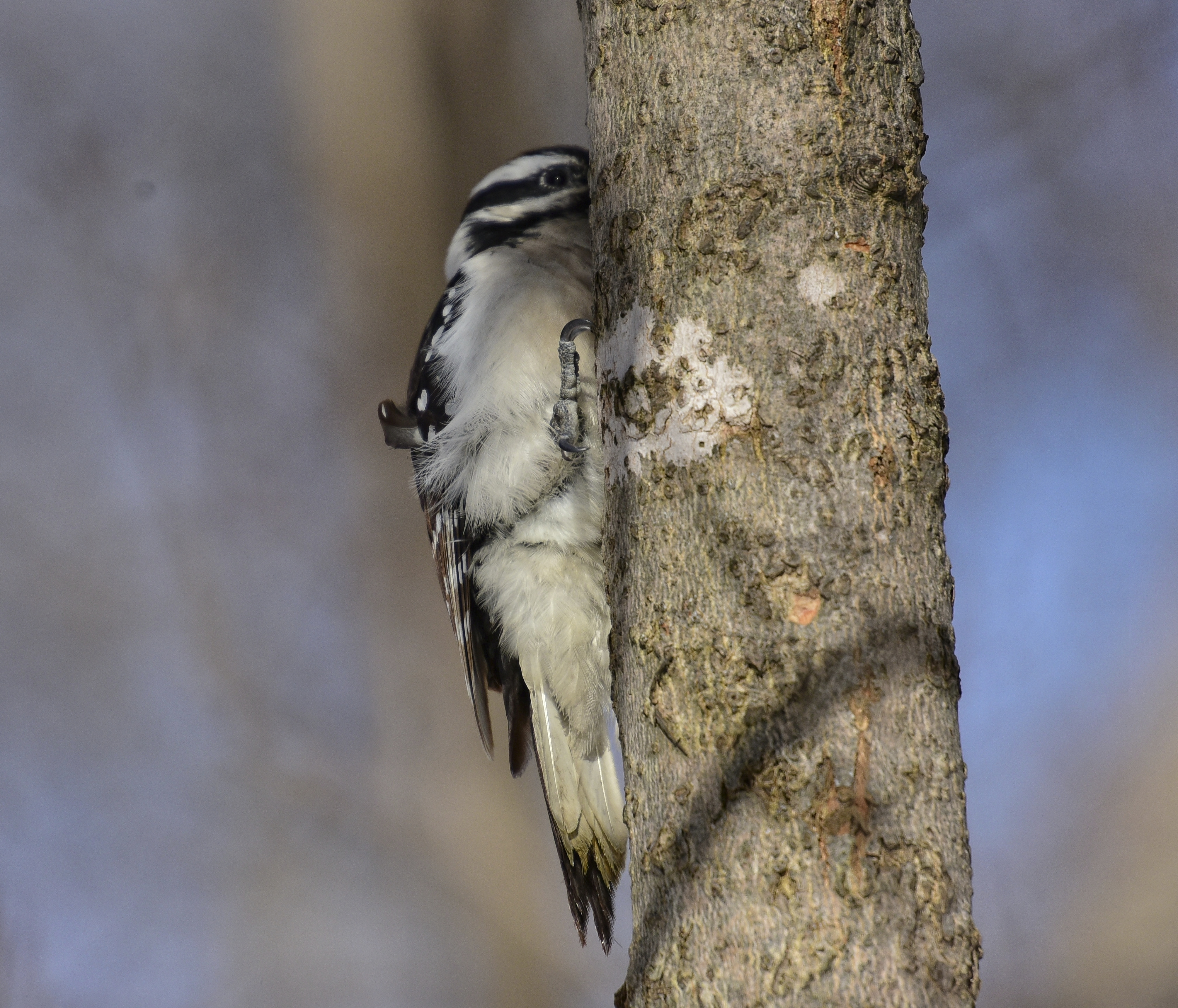 Дятел волохатий (Leuconotopicus villosus) (самиця) у парку Джеймс Ґарденс у Торонто, Онтаріо, Канада